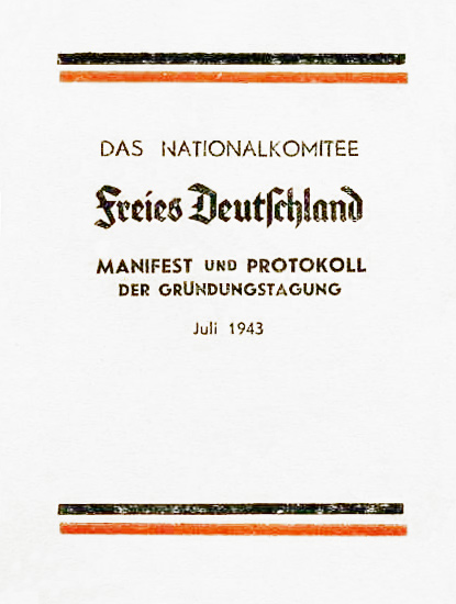 Broschüre mit dem Protokoll und dem Manifest der Gründungsversammlung des Nationalkomitees "Freies Deutschland"